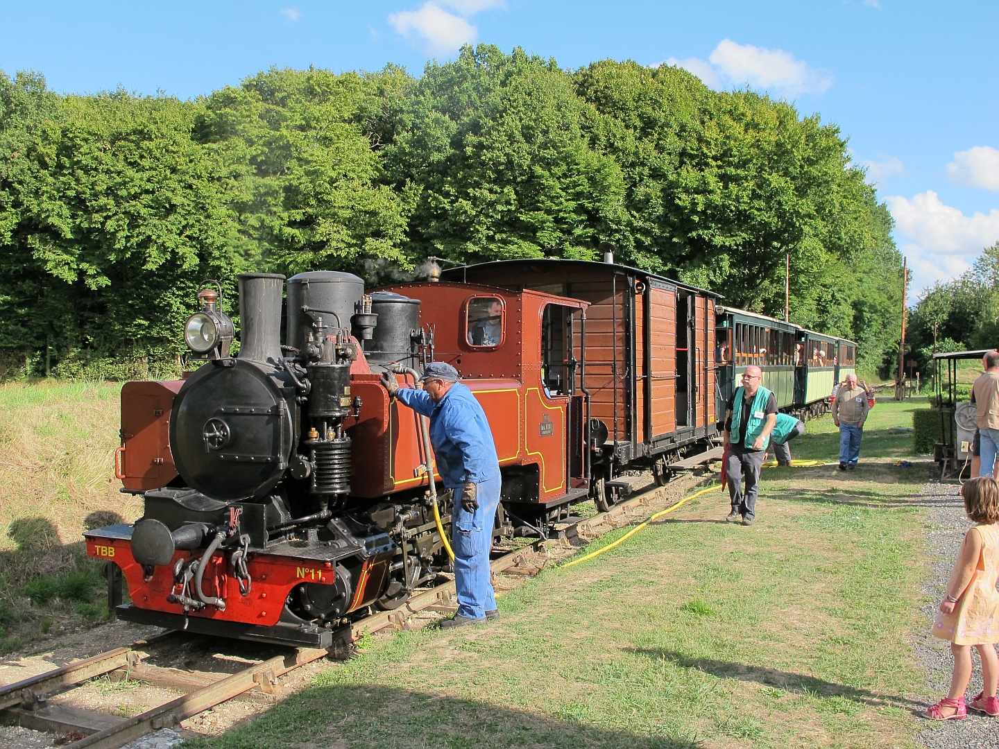 Un train du TBB en gare d'Heugnes (Indre) le 23 août 2015.